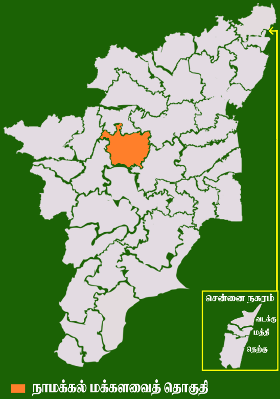 தமிழக வரைபடத்தில் உள்ள நாமக்கல் மக்களவைத் தொகுதி